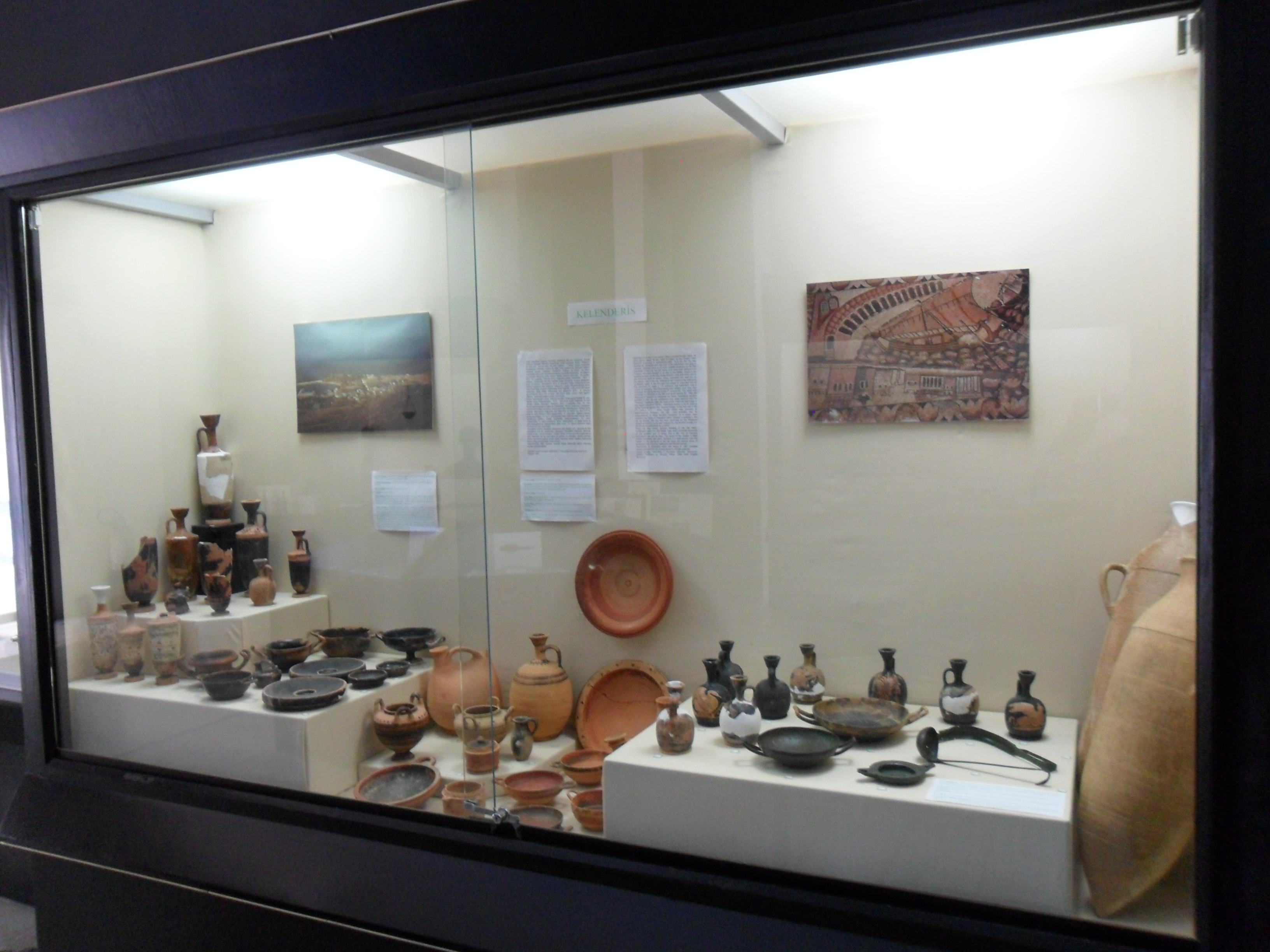 Silifke Müzesinde sergilenen Kelenderis buluntuları.